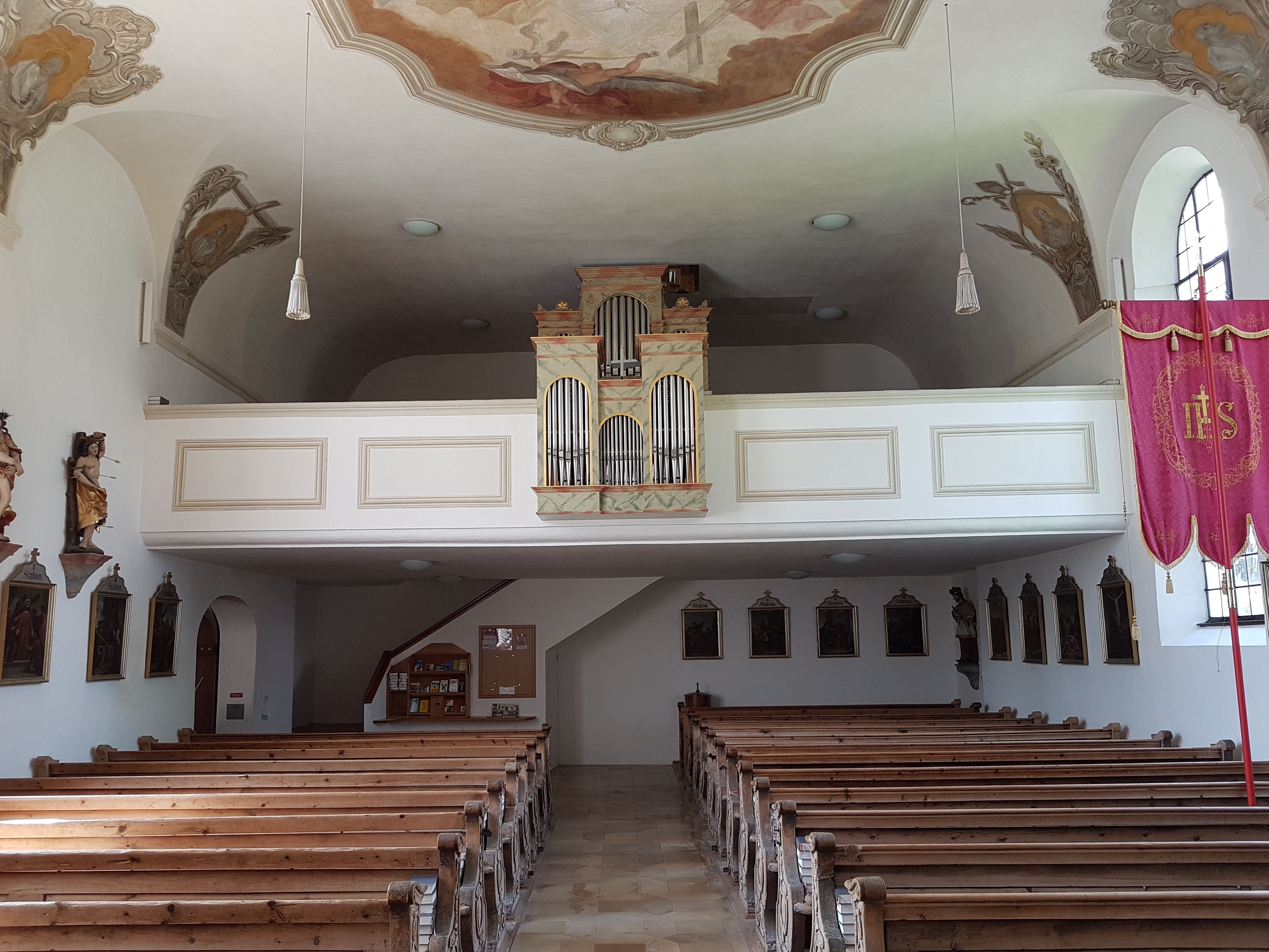 Prem, Kirche St. Michael